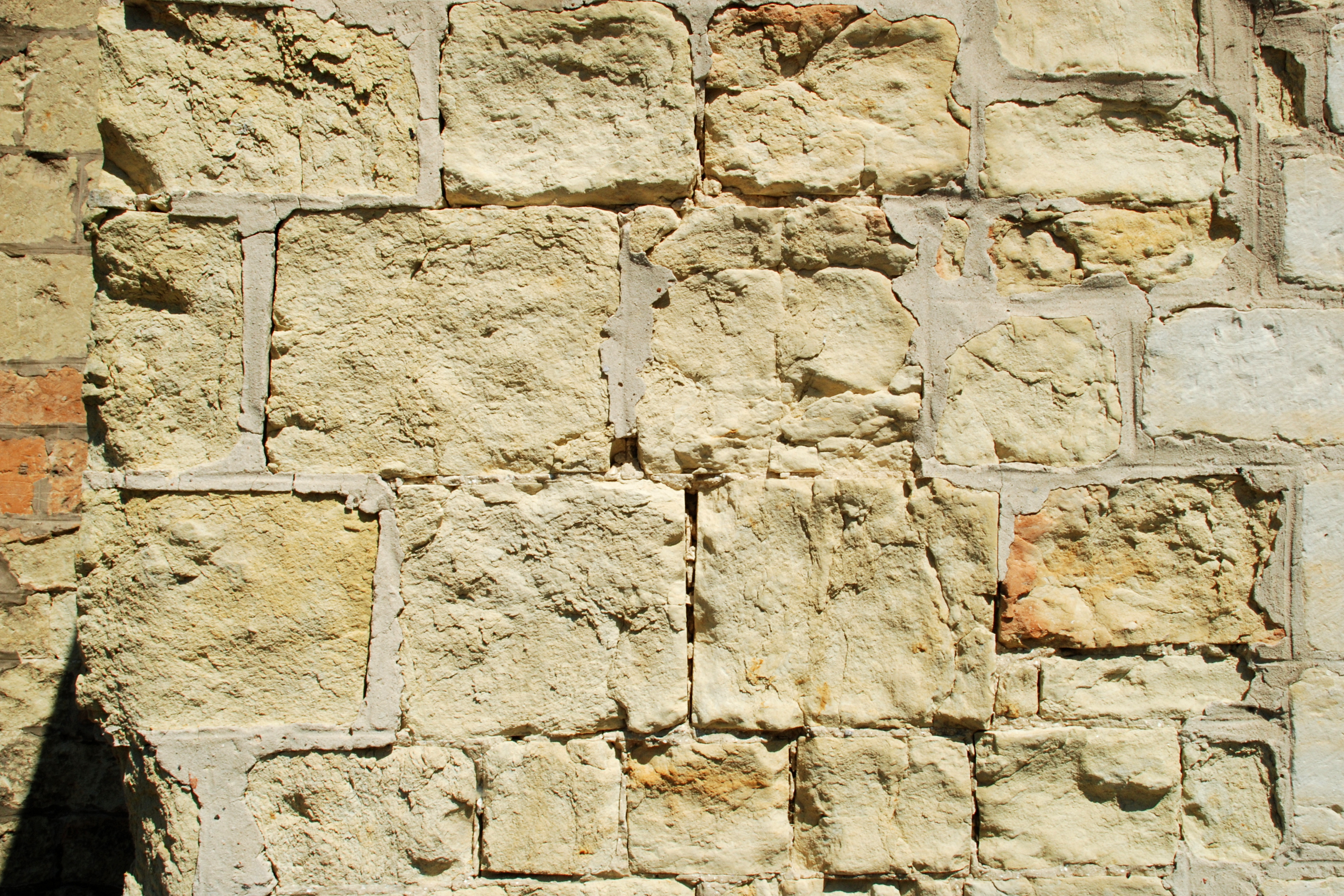 Belgique - Brabant wallon - Hélécine - Neerheylissem - Eglise Saint-Sulpice